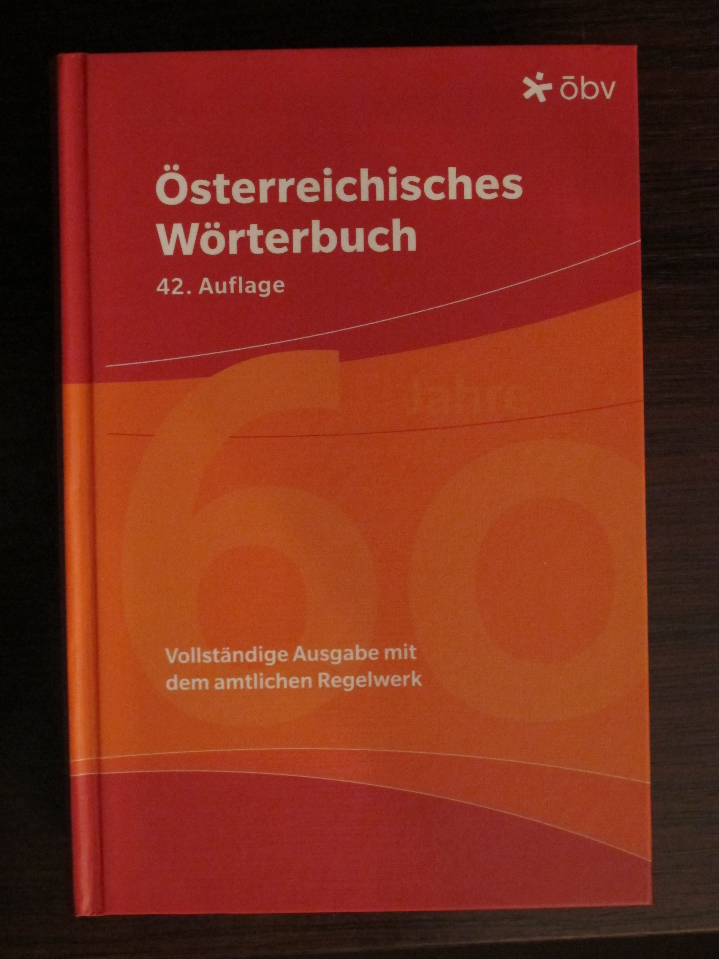 Österreichisches Wörterbuch, 42.Auflage